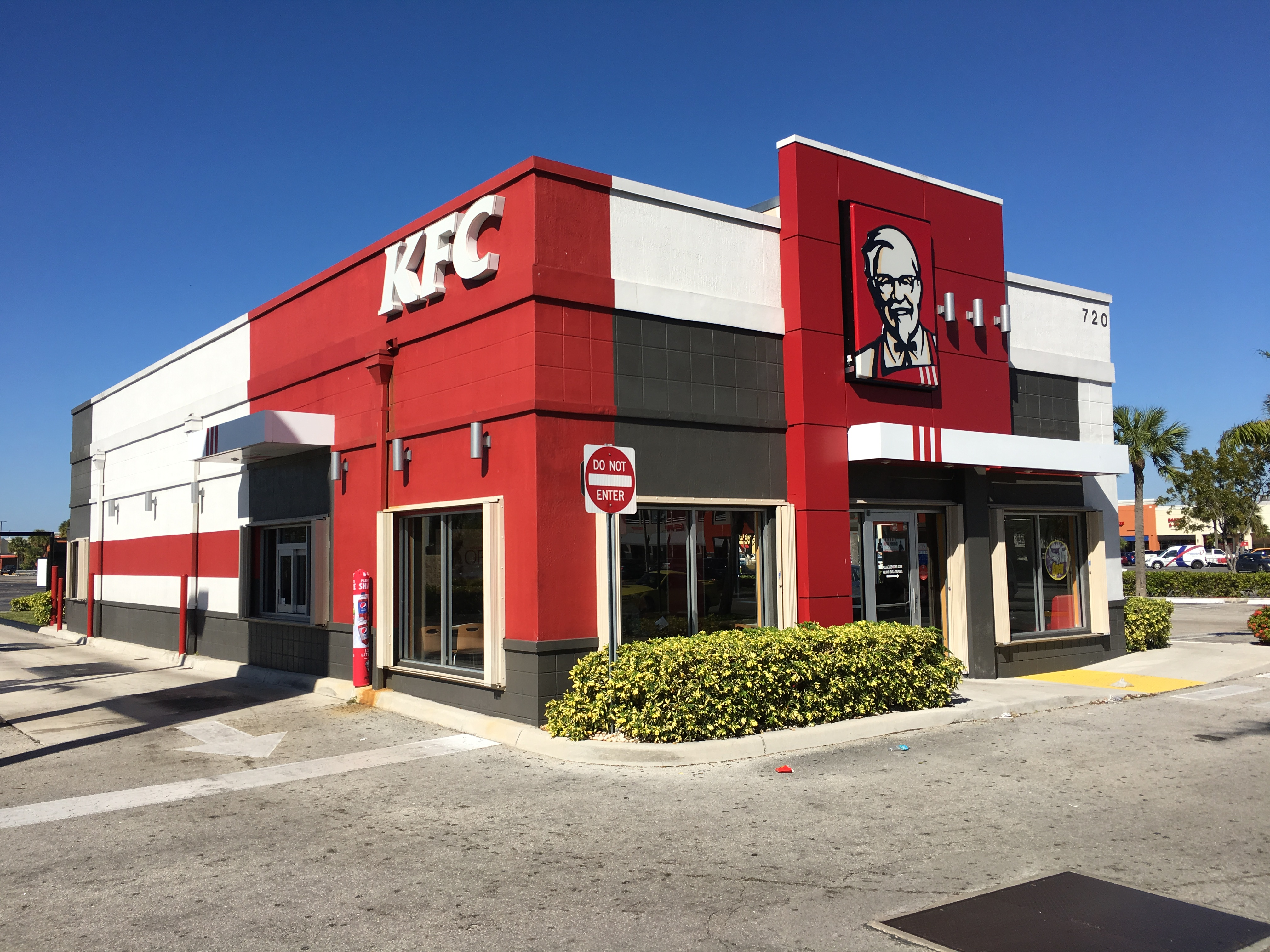 KFC Miami